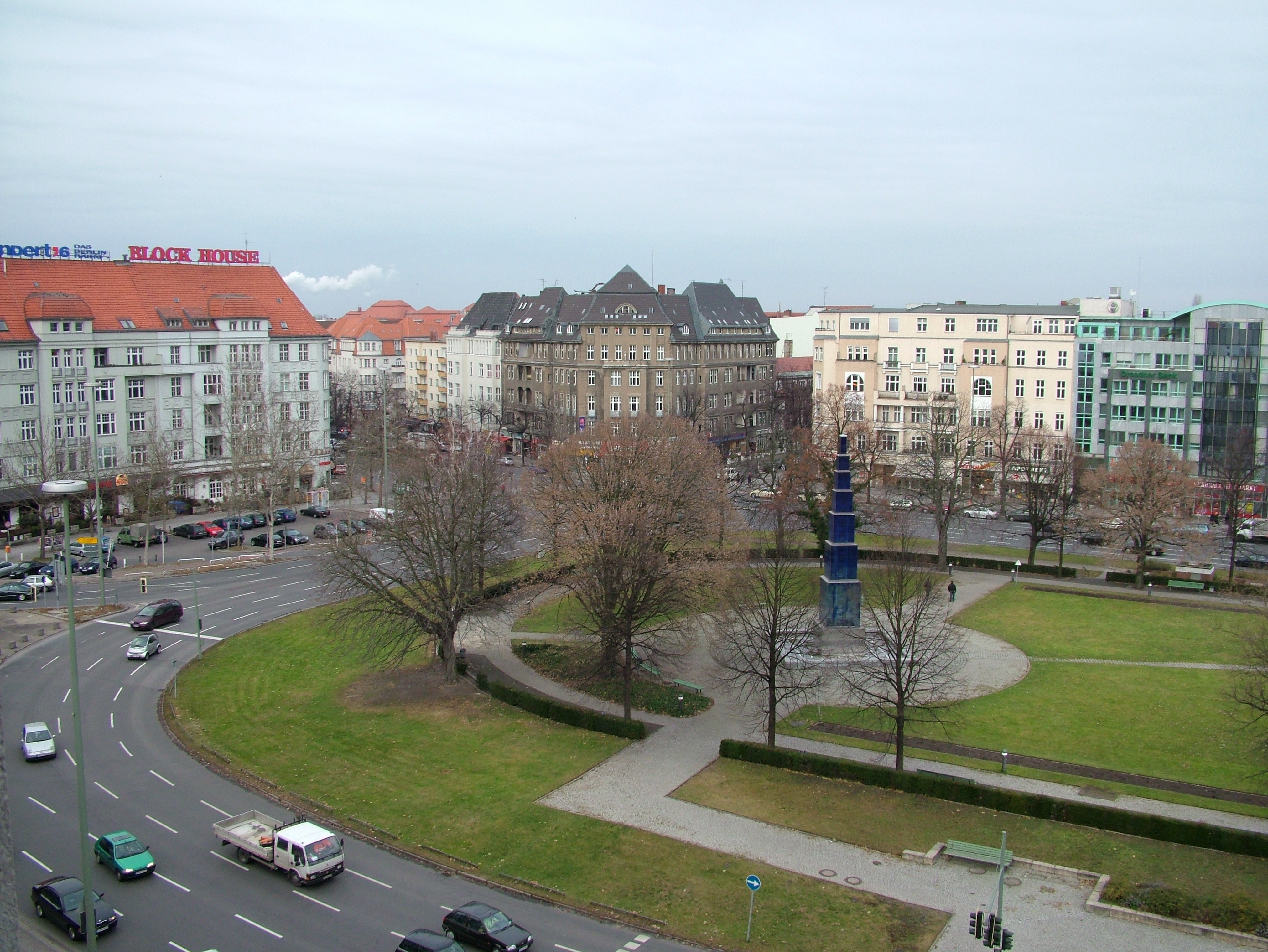 In Berlin der Theodor-Heuss-Platz. Der Blick ist vom Deutschlandhaus (Theodor-Heuss-Platz 7) in Richtung Reichstraße und Lindenstraße. Gut zu sehen ist der Blauer Obelisk der Berliner Künstlerin Hella Santarossa. Selber fotografiert am 30.12.2004.